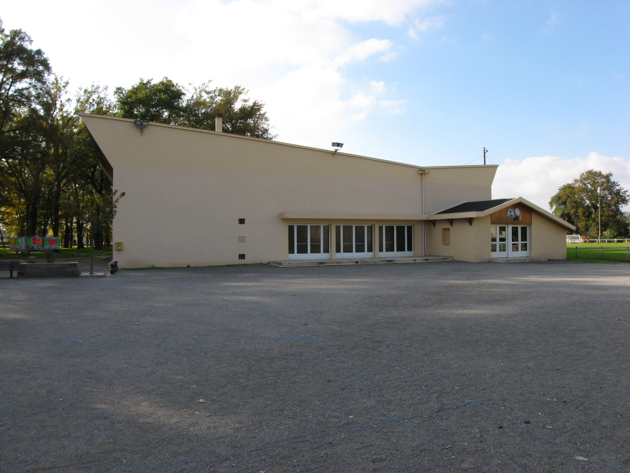 Vue de la salle des fêtes de Ledeuix (Pyrénées Atlantiques) Pyrénées).